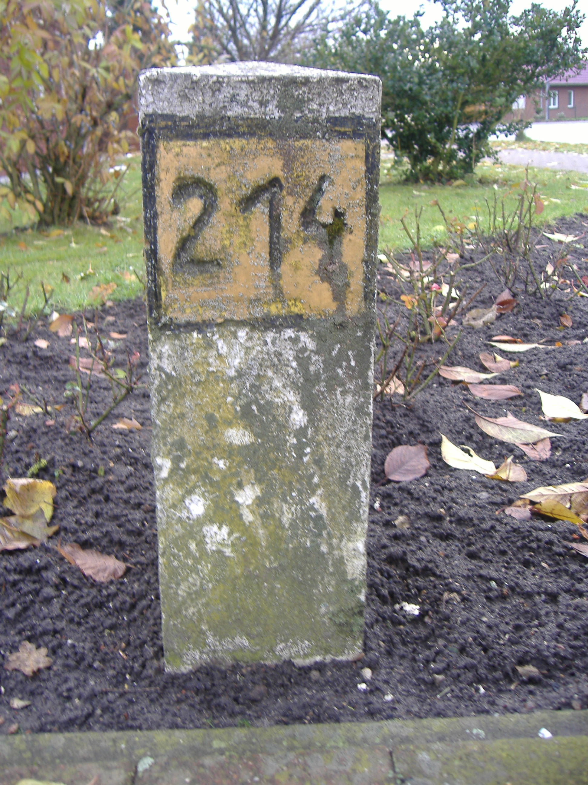 Kilometerstein an der ehemaligen B 214 in Sulingen von vorne. Die Zahl 214 auf gelbem Hintergrund steht für die Straßennumer, die Kilometerzahl steht auf beiden Seiten (siehe Image:Kilometerstein1R.jpg). Im Unterschied zu den Hektometersteinen, wo auf der Vorderseite die volle Kilometerzahl und an den seiten die erste Nachkommerziffer (also 100 Meter) steht, ist bei den Kilometersteinen vorne die Straßennummer und an den Seiten die Kilometerzahl angegeben.